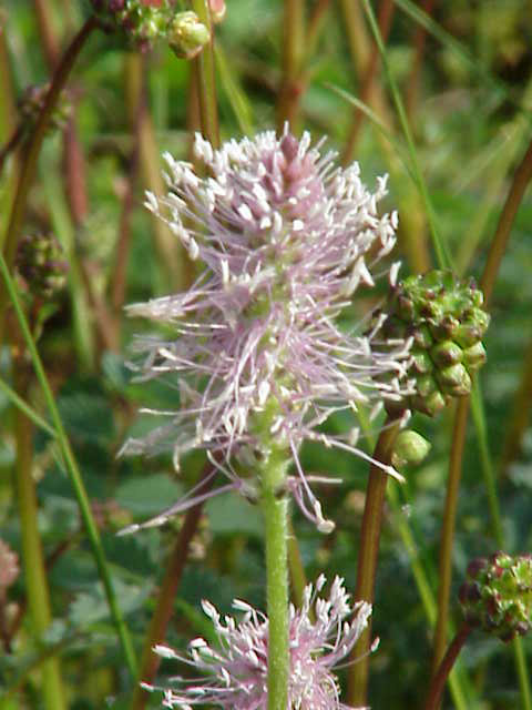 Species: Plantago media Family: Plantaginaceae Image No. 1